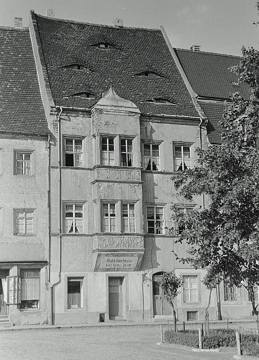 Original image description from the Deutsche Fotothek "Seume-Haus" in Grimma